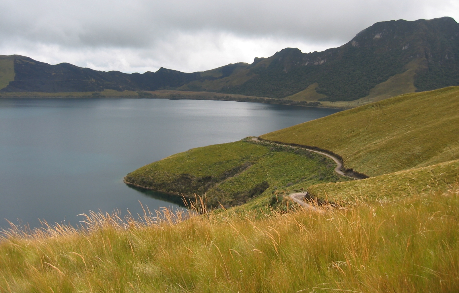 Mojanda caldera